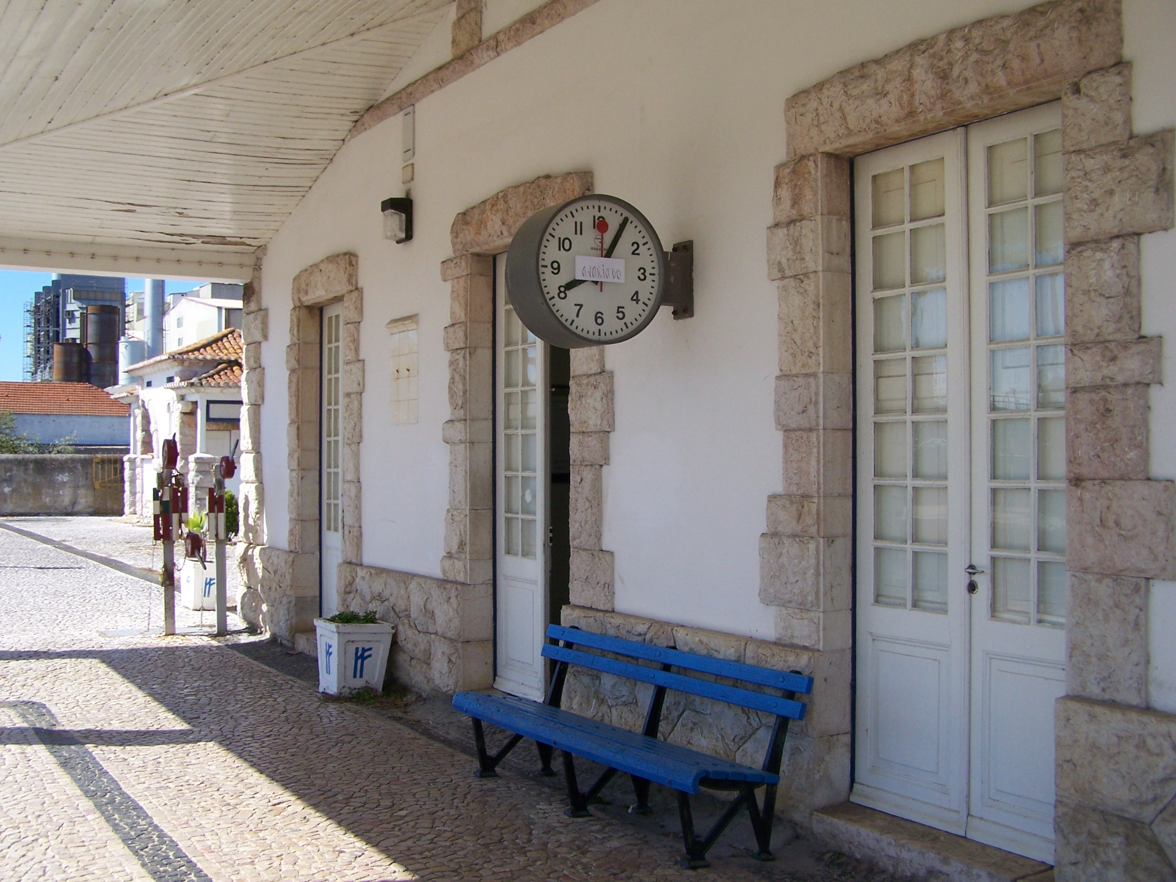 A clock at the portuguese train station Fontela, near Figueira da Foz. Um relógio na estação ferroviária de Fontela, perto da Figueira da Foz.